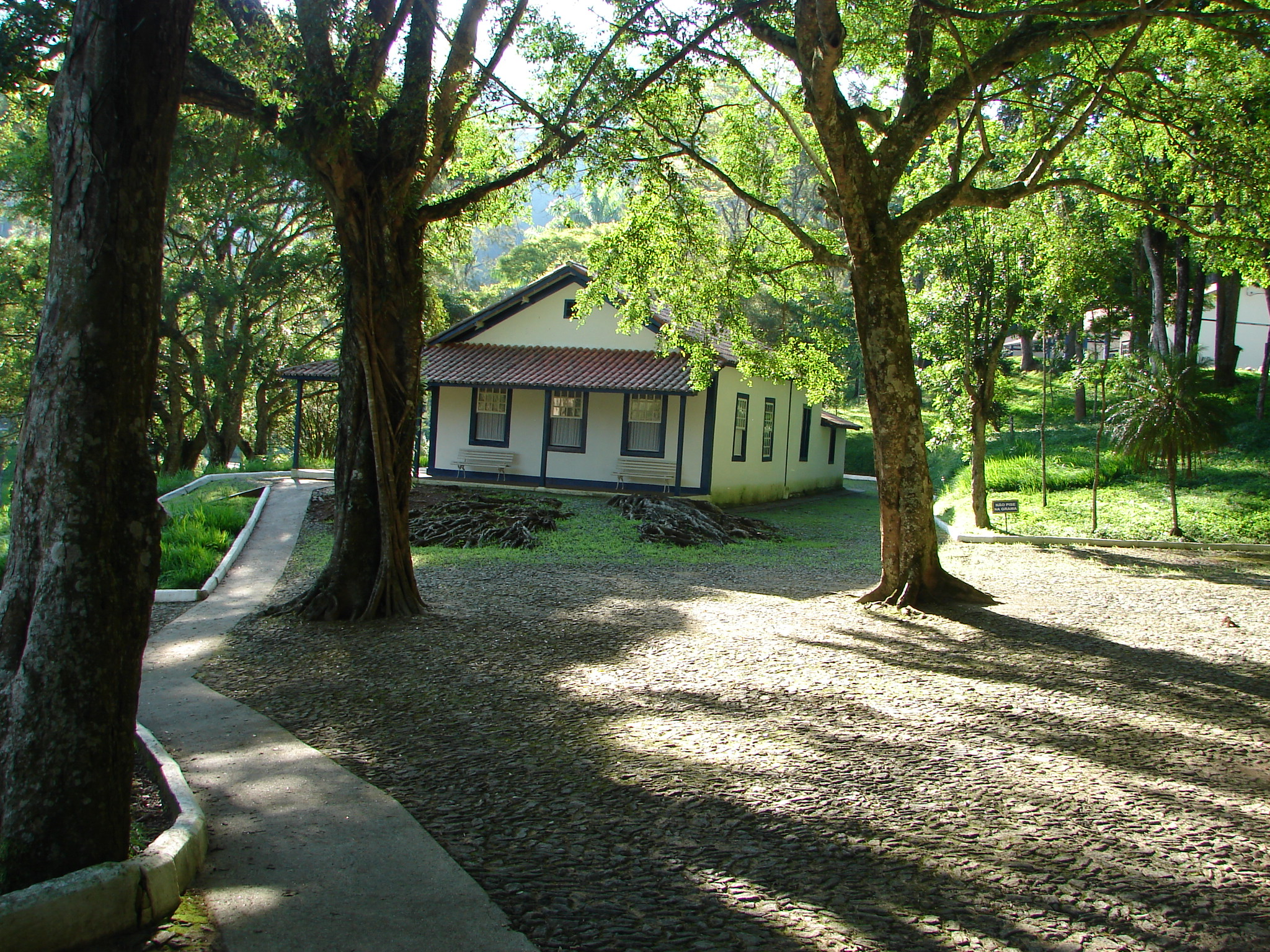 Casa de Santos Dumont na Fazenda Cabungu em Santos Dumont,Minas Gerais